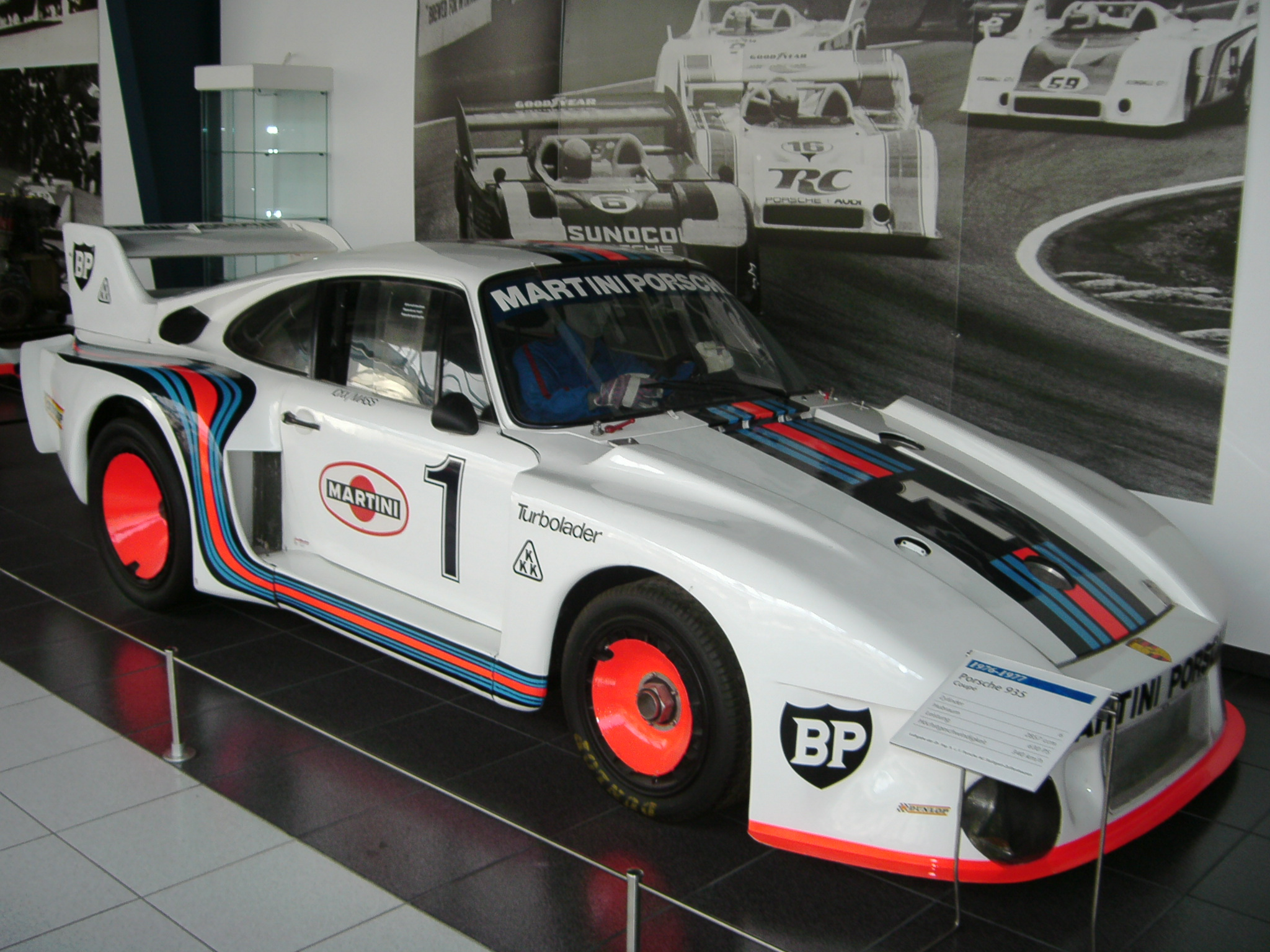 Die Langstreckenrennen der Markenweltmeisterschaft wurden ab 1976 mit so genannten Produktions-Rennsportwagen des neuen Gruppe-5-Reglements gefahren. Dies war das Startsignal für Porsche, den 911 Turbo (interne Bezeichnung 930) zum 935 weiterzuentwickeln. Dabei konnte man die mit dem 911 RSR Turbo im Jahre 1974 gemachten Erfahrungen voll nutzen. Gegenüber dem Turbo RSR mit seinem spektakulären Heckflügel waren beim 935 Form und Größe des Heckflügels begrenzt. Und sie durften die Konturen des Wagens, von vorn gesehen, nicht überragen. So erhielt der 935 einen verstellbaren, waagerechten Flügel, angelenkt zwischen zwei senkrechten Flossen. Auch war es bei der Formgestaltung des Heckspoilers, der wegen eines FIA Beschlusses nachträglich nochmals umgebaut werden musste, nahe liegend, außer Kühl- und Ansaugluftöffnungen auch die Ladeluftkühlung unterzubringen. Da die Gestaltung der vorderen Kotflügel freigestellt war, schnitt man die Oberkante einfach ab, entfernte auch die Scheinwerfer und versah die Flächen stattdessen mit einer Reihe von schmalen Schlitzen, durch die ein erhöhter Abtrieb der Vorderachse erzielt wurde. 600 PS stark, wurde der 935 von Porsche in den Langstreckenrennen der Marken-Weltmeisterschaft 1976 eingesetzt. Die Premiere gelang: In Mugello wie auch beim nächsten Rennen in Vallelunga fuhren Ickx/Mass auf Anhieb den Gesamtsieg heraus und konnten damit, nach fünfjähriger Pause, wieder eine Marken-Weltmeisterschaft für Porsche entscheiden. Der 935 gehört zu den erfolgreichsten Fahrzeugen in der Ära der seriennahen Rennsportwagen. Quelle: Jährlich machen auch verschiedene Oldtimerclubs und Ralleys Station im Sporthotel Achental und genießen die Vielfältigkeit der Touren durch den Chiemgau.